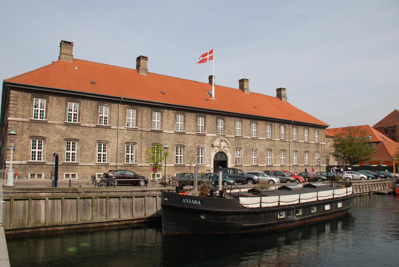 Staldmestergården at Slotsholmen in central Copenhagen, Denmark